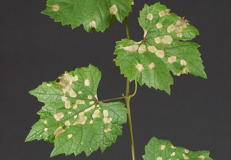 Schwarzfäule der Rebe